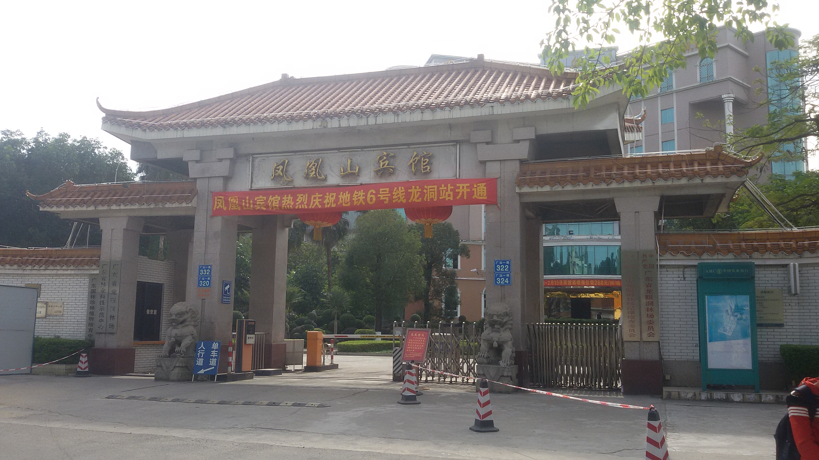 粵語: 廣州鳳凰山賓館